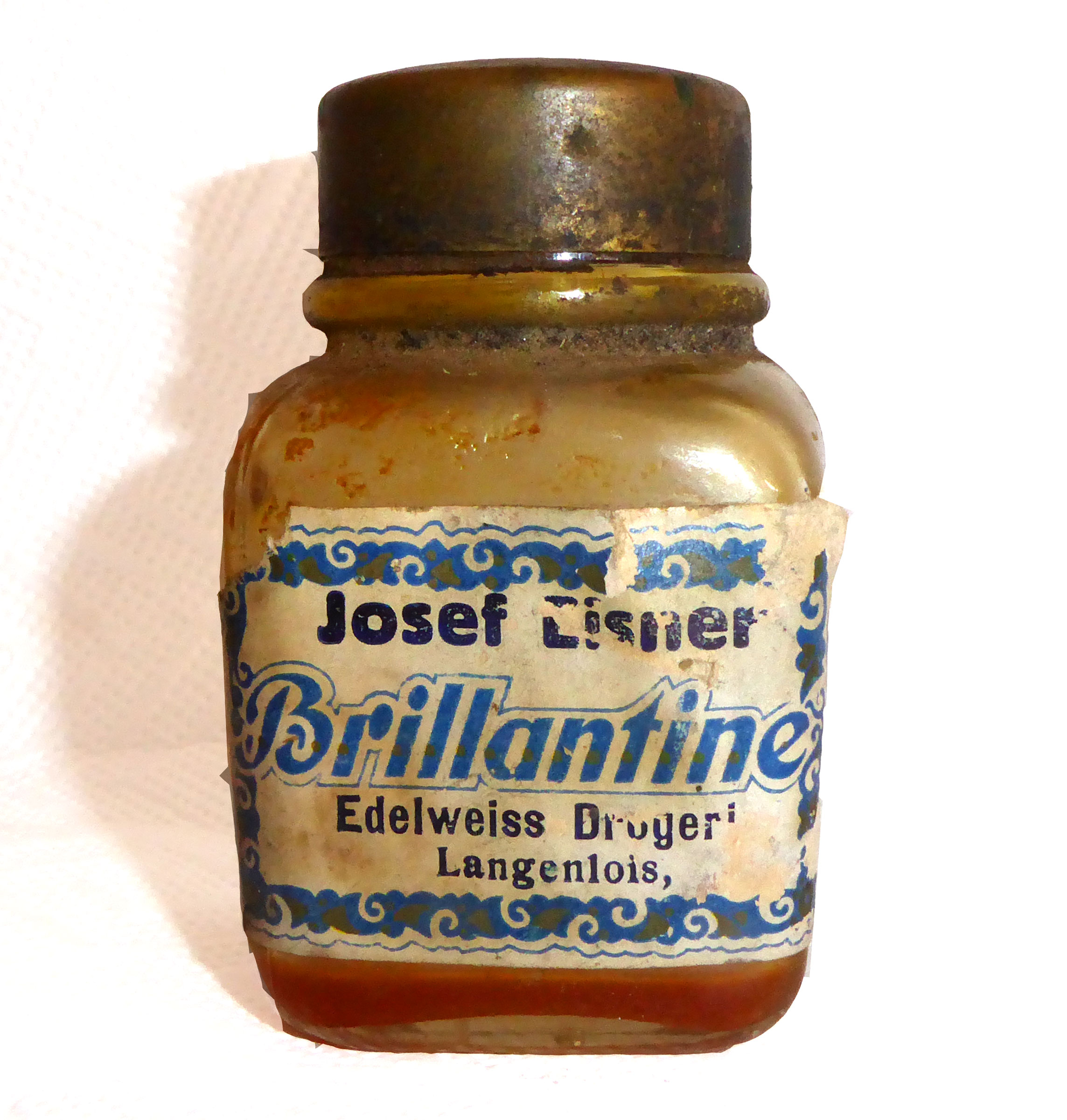 Brillantine / um 1910, Josef Eisner, Drogerie zum Edelweiss, Langenlois (Niederösterreich); Glasflasche: H=7,5 cm; B=4,5 cm; T=4 cm / Messingkappe D=3,5cm; H=1,5cm